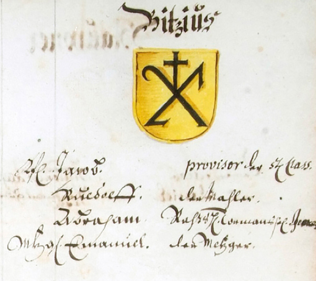 Wappen der Berner Familie Bitzius, in: Wappenbuch der bernischen burgerlichen Geschlechter. Offizielle Registratur der bernischen Geschlechter, 1684 (Burgerbibliothek Bern, Mss.h.h.XII.358). S. 35.